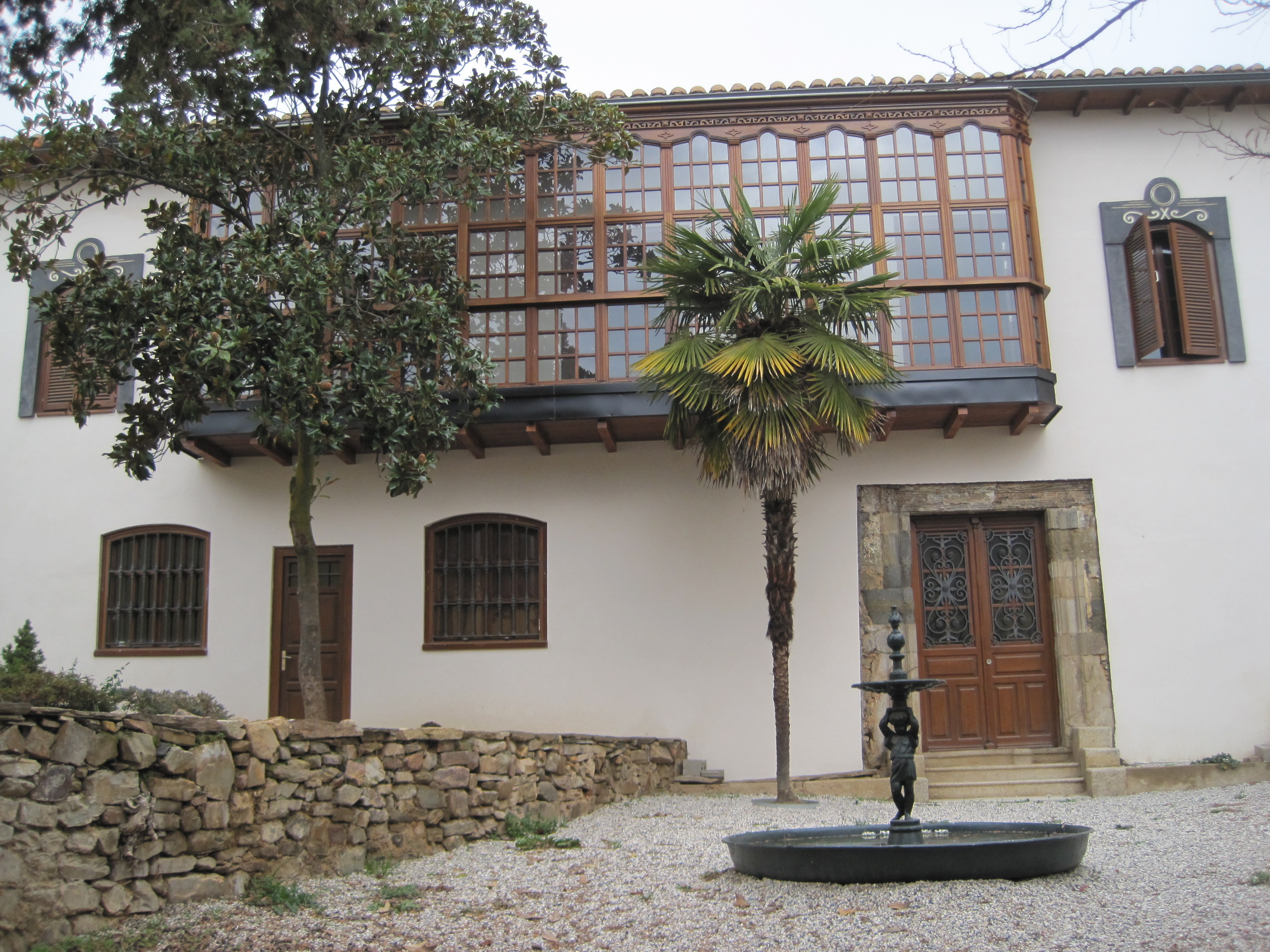 Casa de los Panero, en Astorga (León, España).